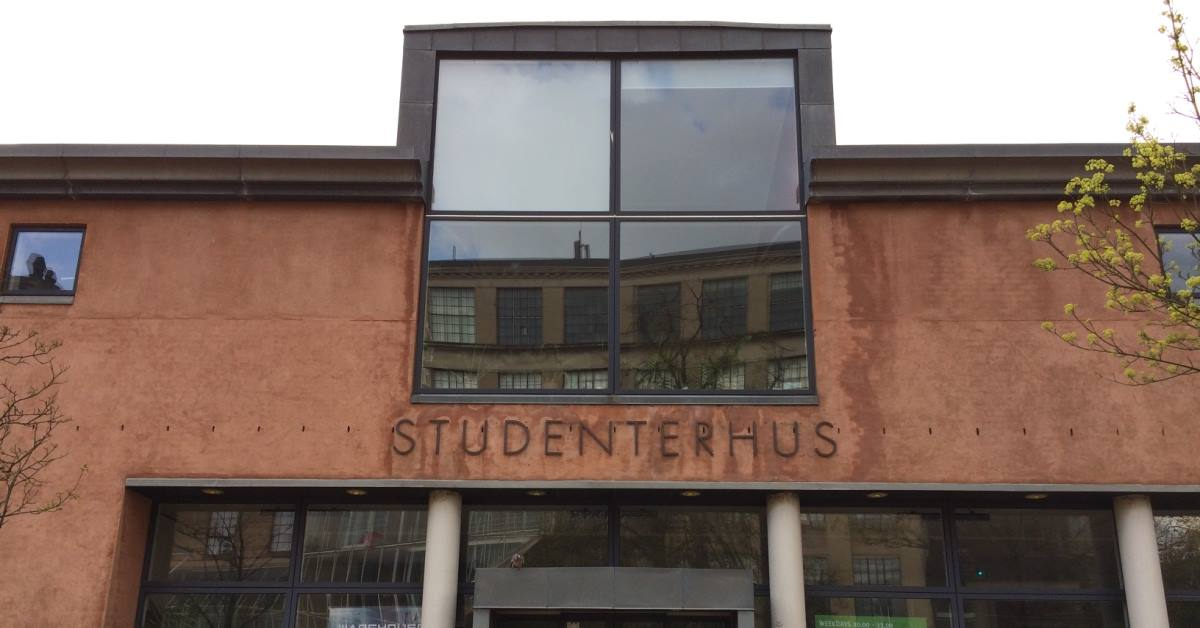 Studenterhusets facade ud til Amfipladsen. Odense, Maj 2015.